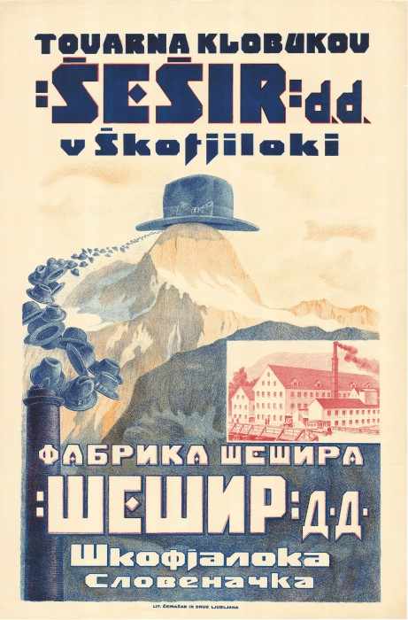 Plakat za Tovarno klobukov Šešir d.d. v Škofji Loki